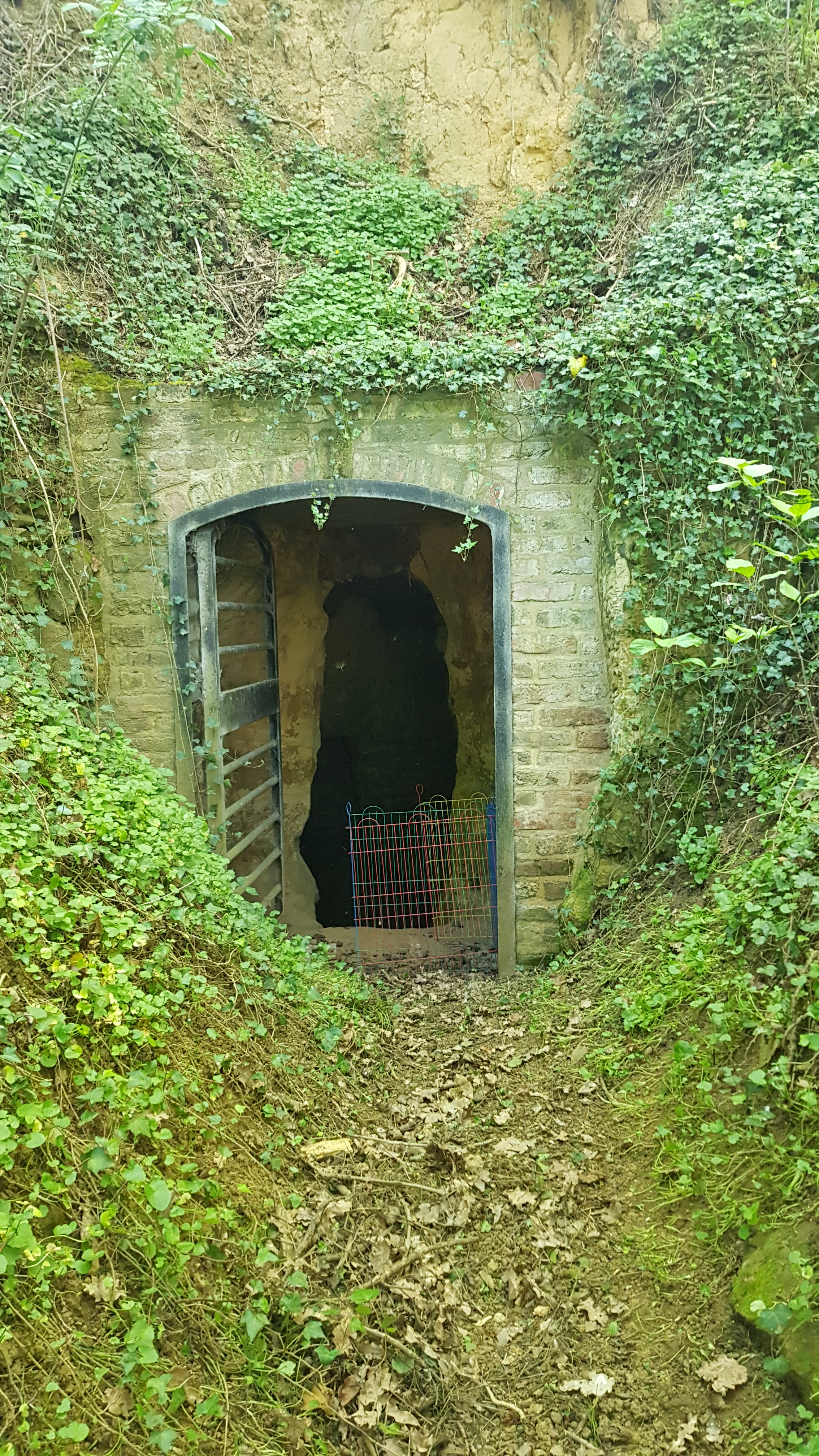 Craoteloak, Craubeek, Nederland